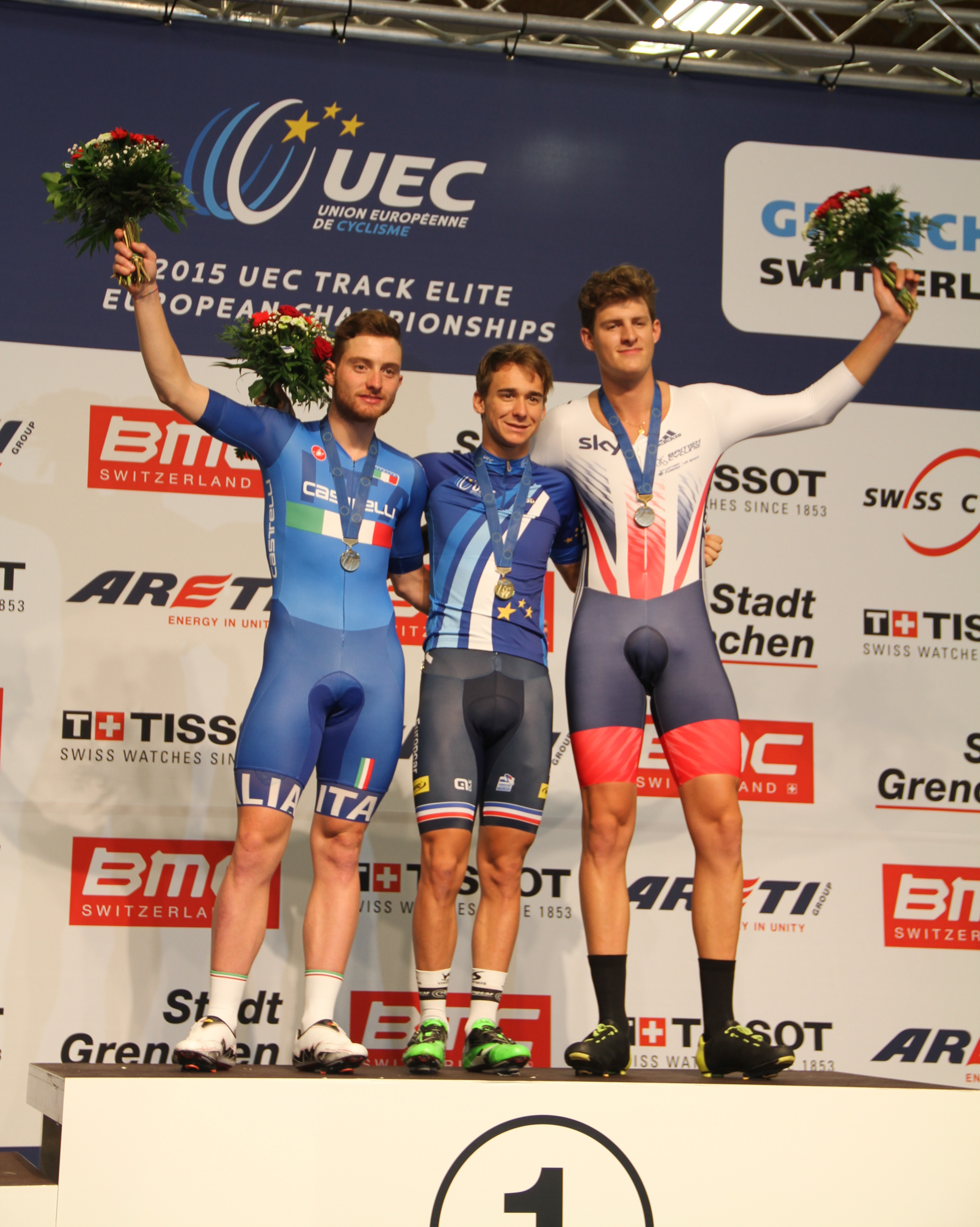 Podium Ausscheidungsfahren (v.l.n.r.): Simone Consonni, Bryan Coquard, Christopher Latham The making of this document was supported by the Community-Budget of Wikimedia Germany.